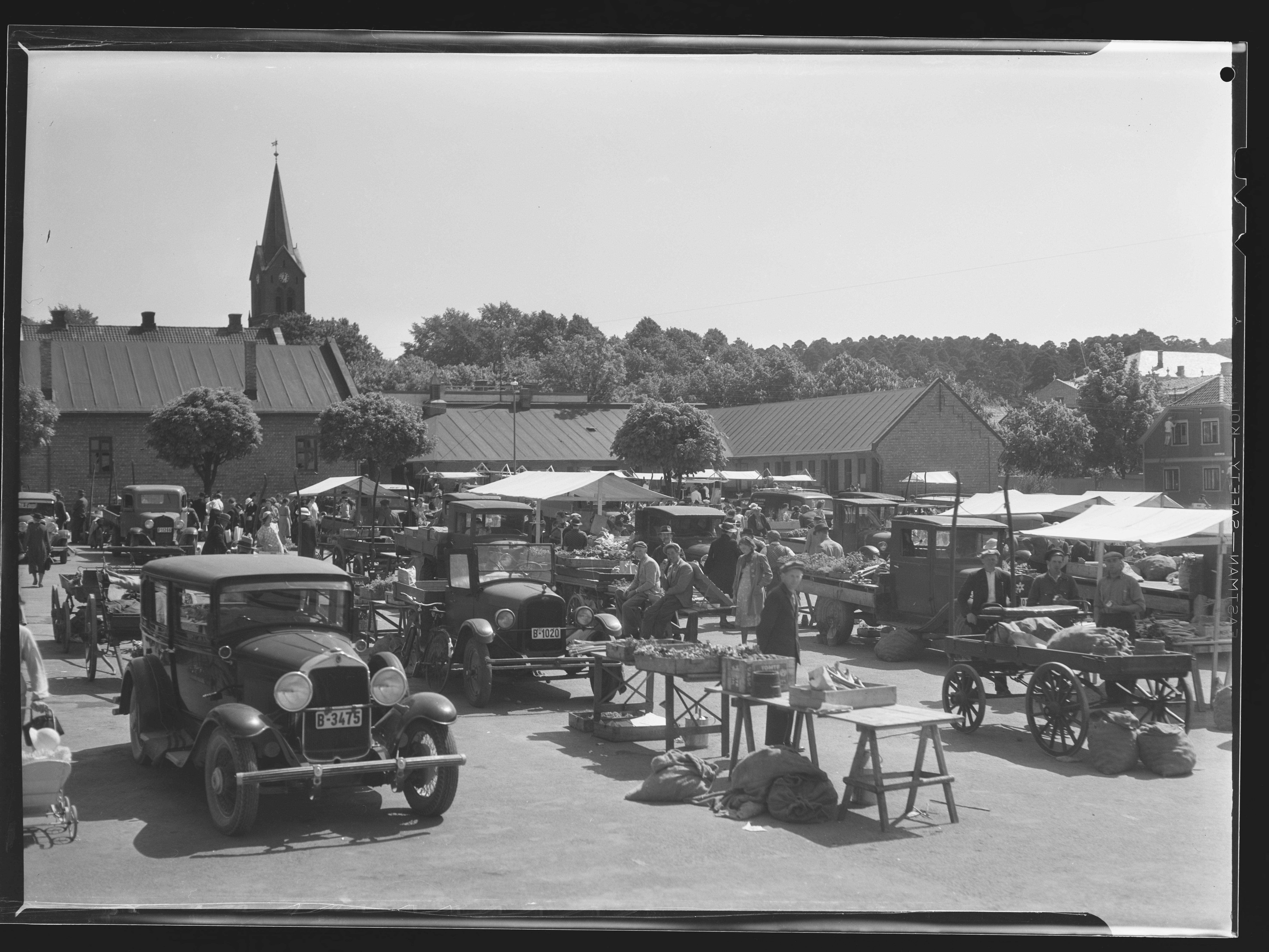 Bildet er hentet fra Nasjonalbibliotekets bildesamling. Anmerkninger til bildet var: Fotograf ukjent. Sarpsborg, Sarpsborg, Østfold